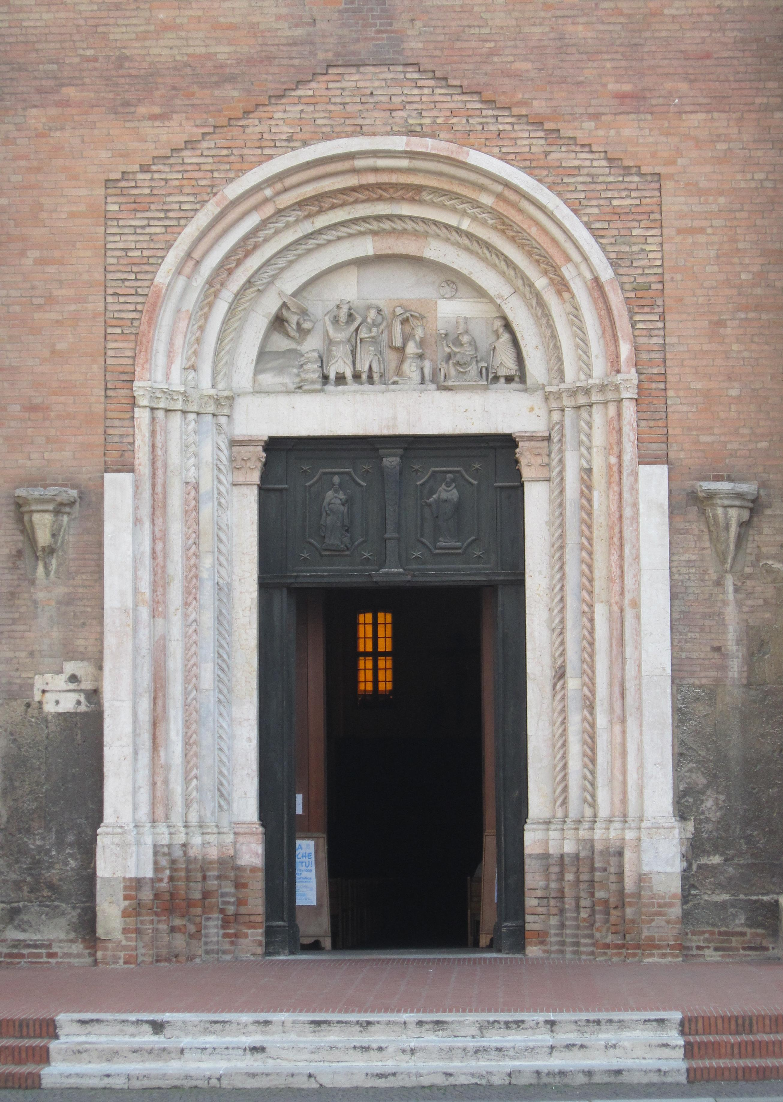 Portale dell'abbazia di San Mercuriale, Forlì, foto propria